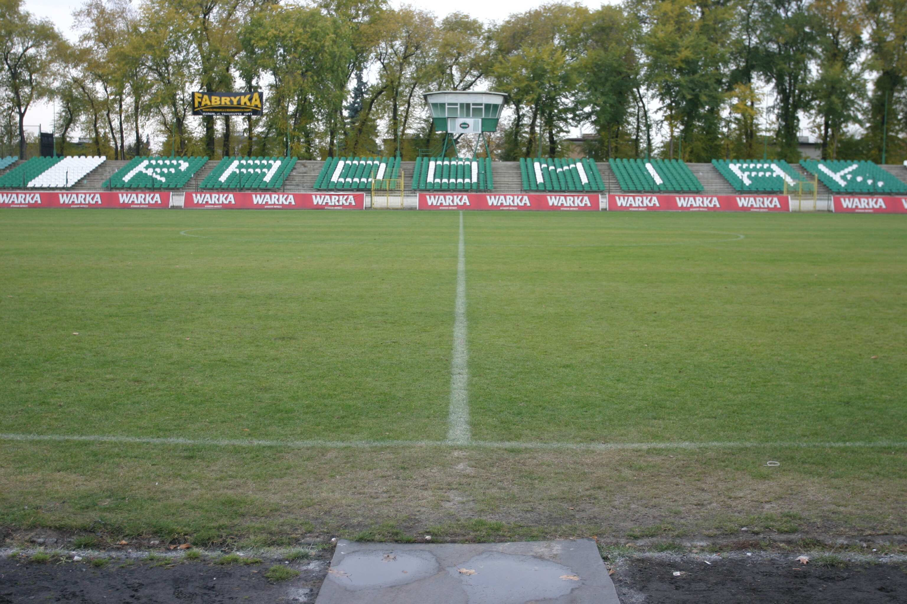 Stadion RKS Radomiak - obiekt sportowy Radomiaka Radom